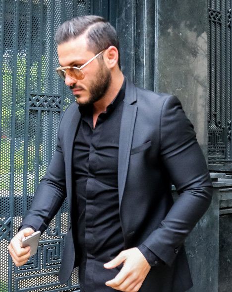 آرمین 2AFM در تشییع پیکر علی طباطبائی